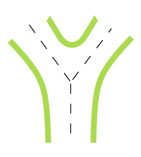 Y形平面道路交叉口